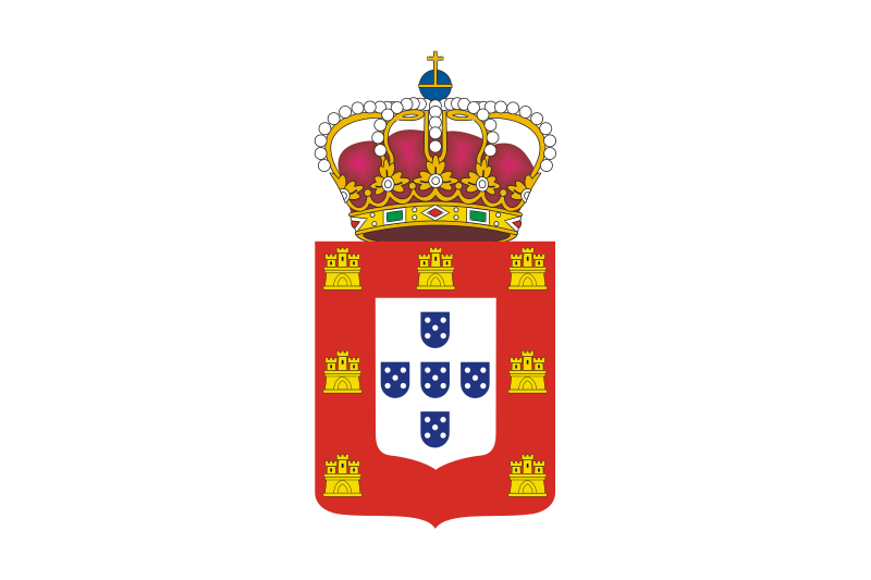 De Tonyjeff, based on ancient national symbol. - XVII century, Dominio público